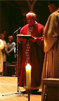 Ausschnitt aus einem Foto von der Altarweihe in der Herz-Jesu-Kirche, Koblenz